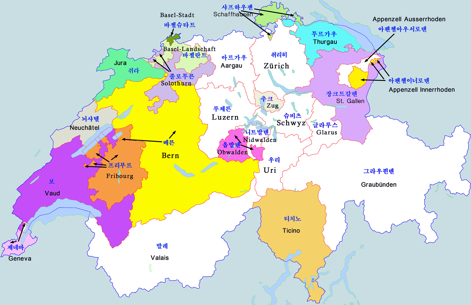 스위스 행정구역